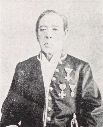 原善三郎（1827-1899）